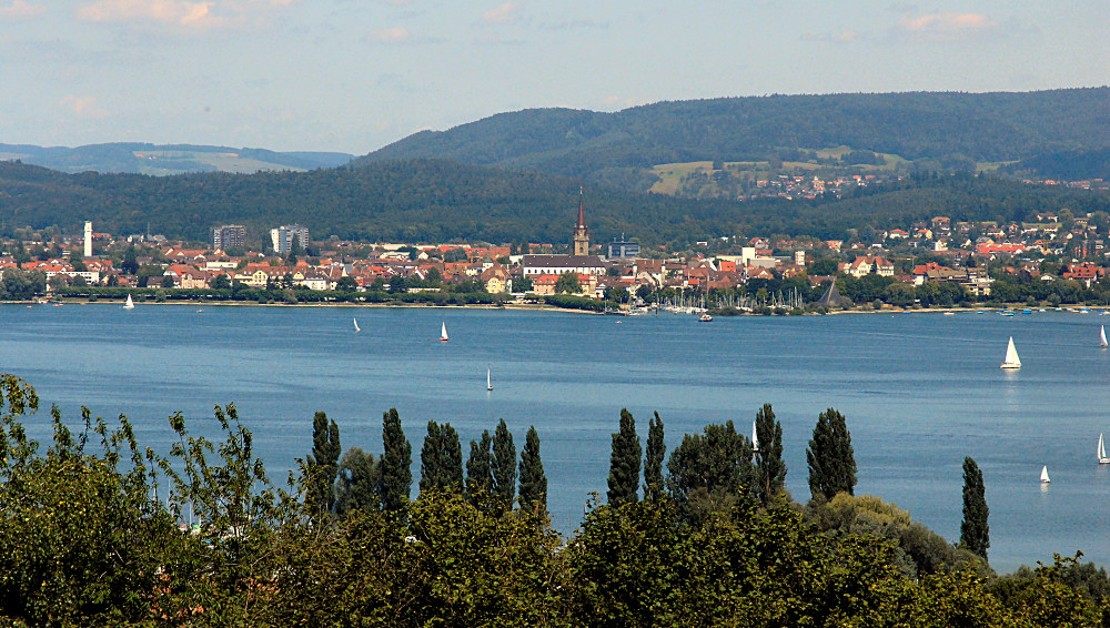 Radolfzell von der Halbinsel Höri aus fotografiert